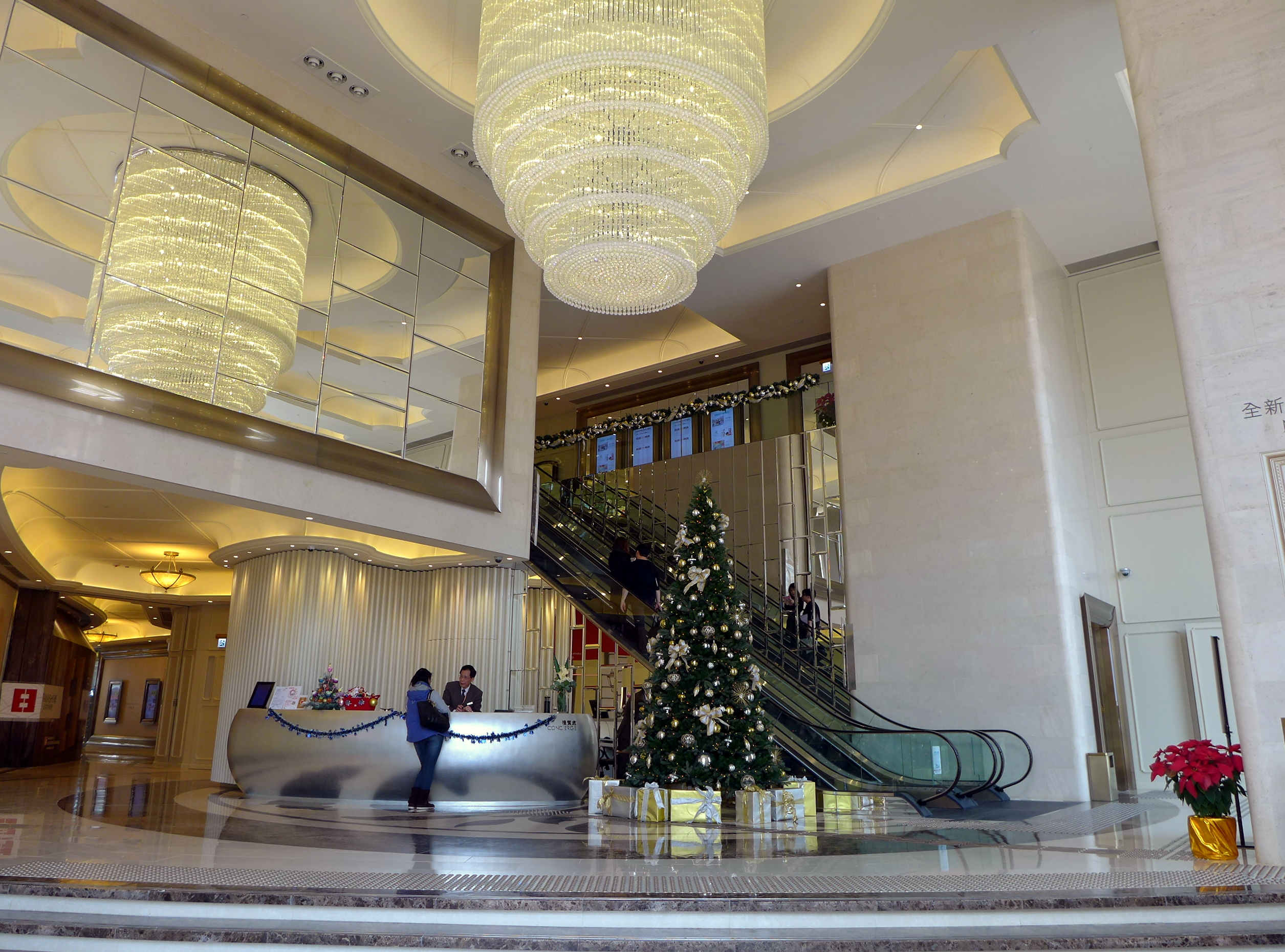 Coronation Circle Main Entrance Void